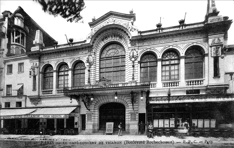 illustre théâtre parisien